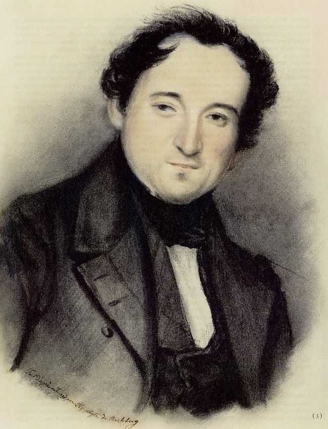 ТЮТЧЕВ Акварель И. Рехберг, 1838. Слева внизу подпись (чернилами): «Fait d’après nature par Hippolyte de Rechberg» («Сделано с натуры Ипполитой Рехберг»); ниже (карандашом): рукой Эрн. Дёрнберг: «9 Mars 1838» («9 марта 1838») Музей-усадьба Мураново им. Ф. И. Тютчева, Москва